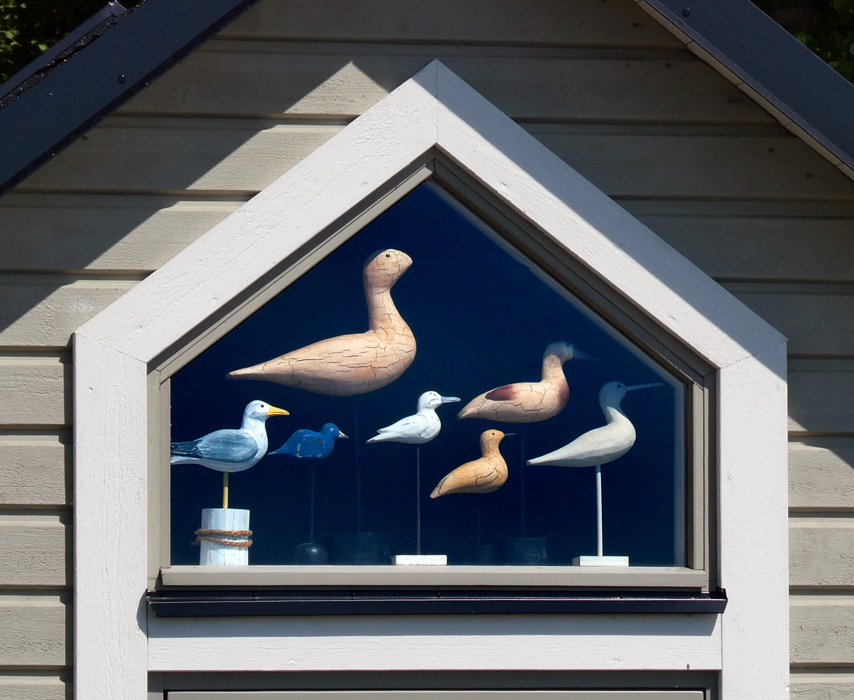 Skulpterade fåglar i trä dekorerar ett fönster i en badhytt vid Ystads Saltsjöbad 2020.